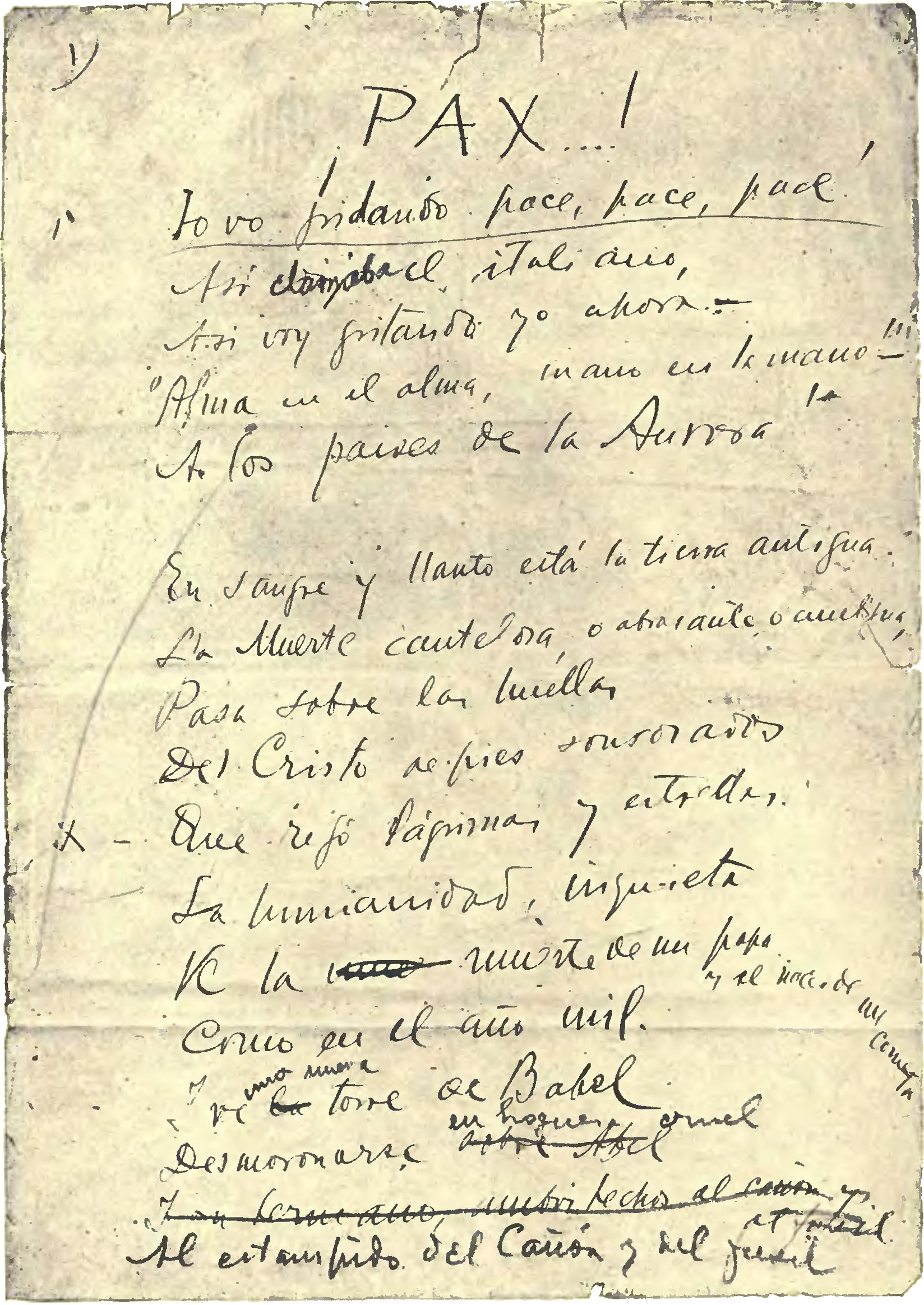 Facsimil del poema Pax de Rubén Darío